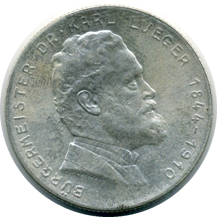 Bildseite der 2-Schilling-Gedenkmünze aus dem Jahr 1935